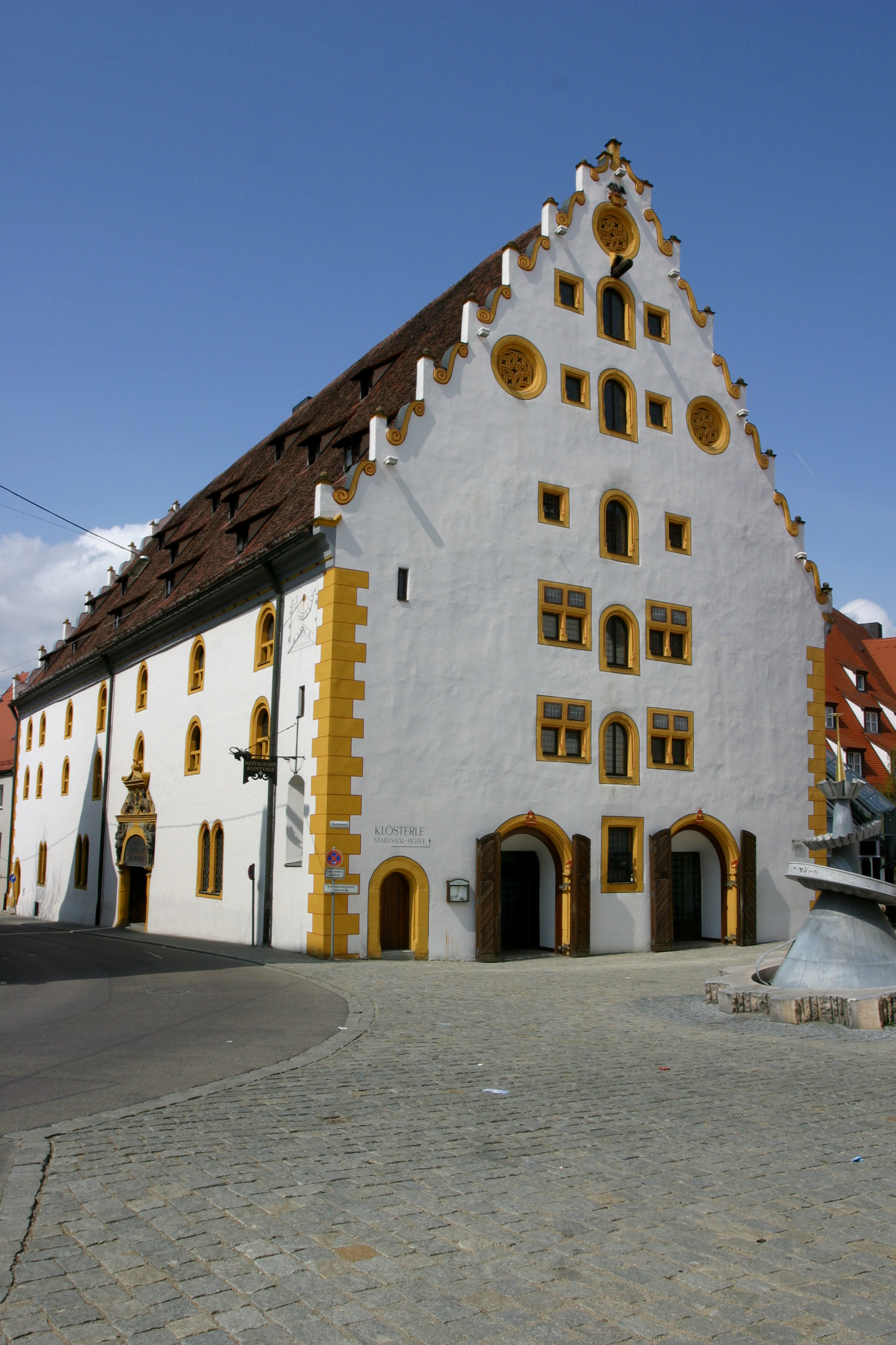 Nördlingen (Bayern), Germany: Klösterle (heute NH Hotel Klösterle)